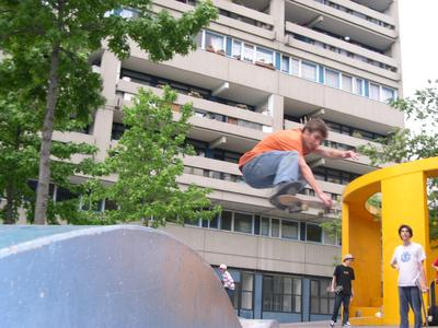 C'est un boneless de wikireporter ( donc moi) , c'est donc ma propriété . Je veux l'utiliser pour completer un article sur le boneless. Je le met sous la licence GNU.